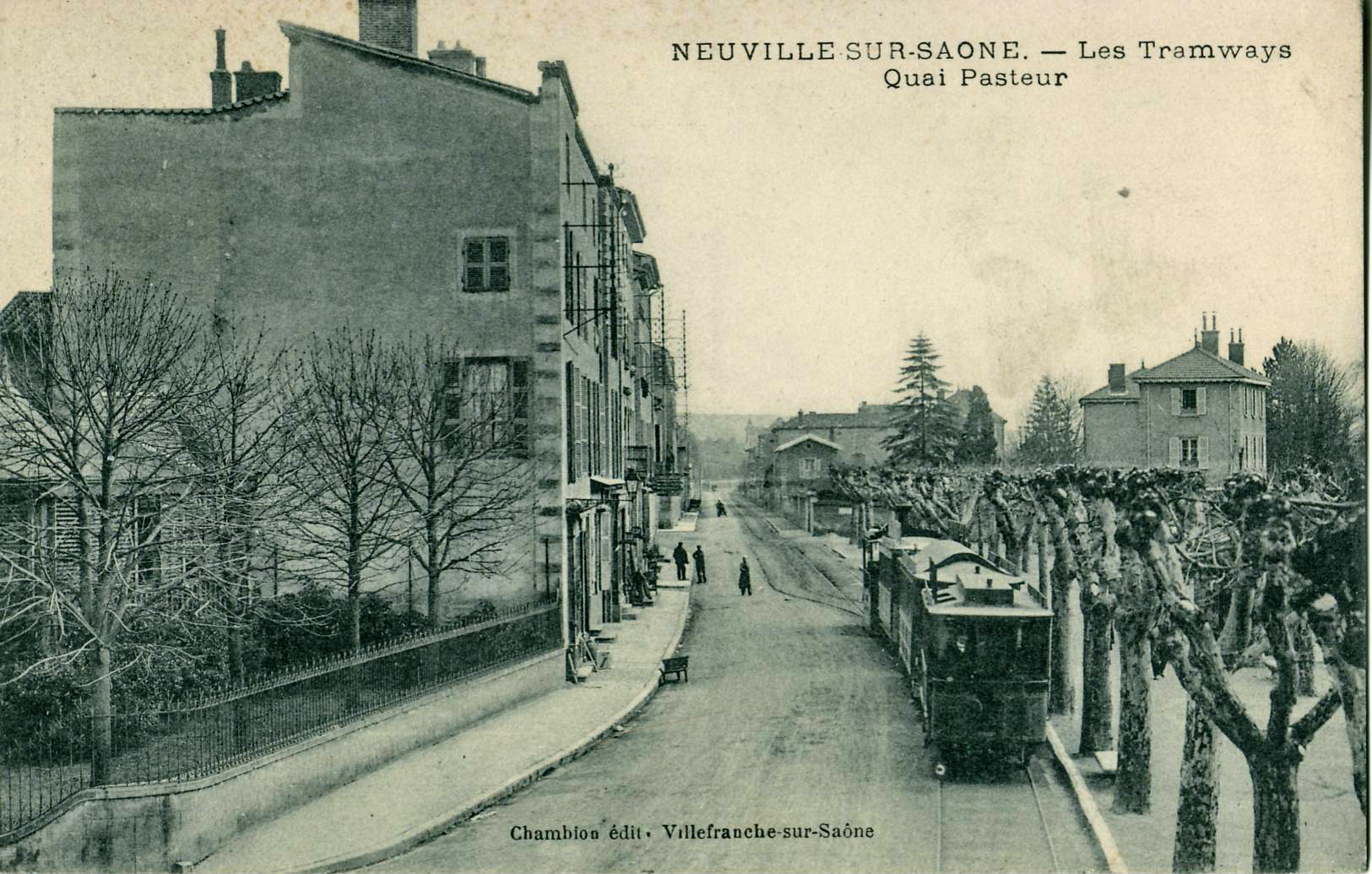 Carte postale ancienne éditée par Chambon à Villefranche-sur-Saône : NEUVILLE-SUR-SAÔNE - Les Tramways - Quai Pasteur